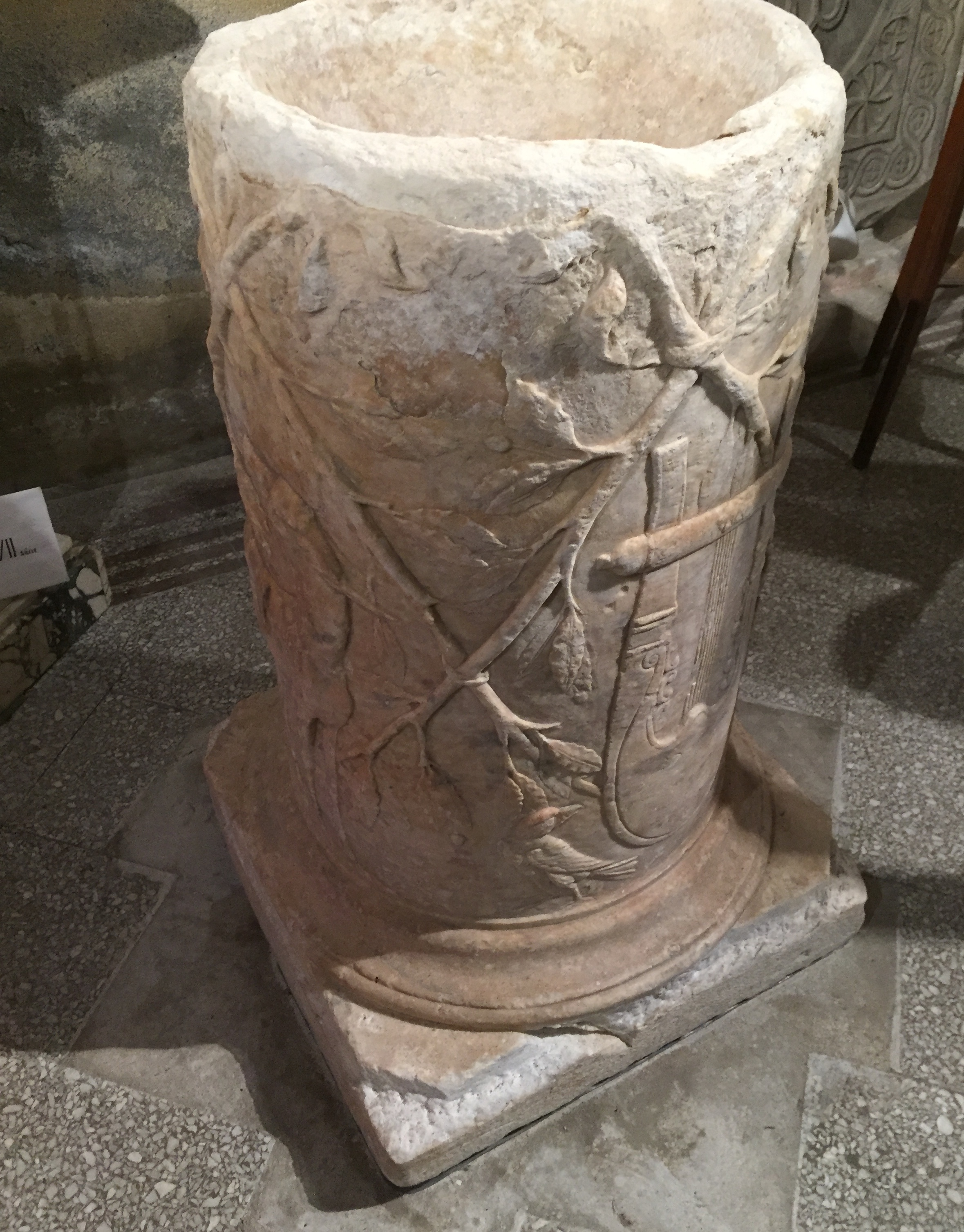 Font baptismal, attributs Diane et Apollon